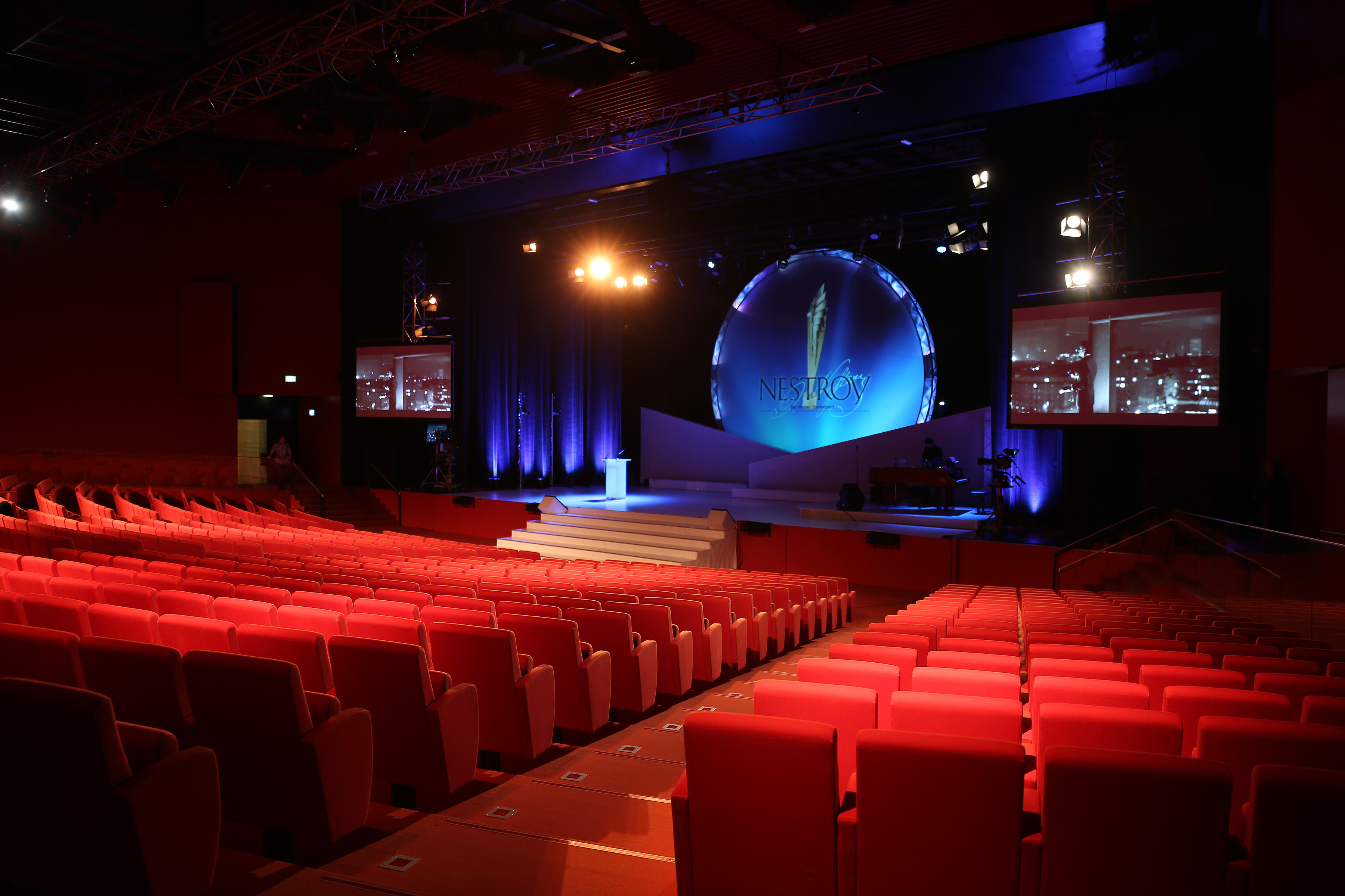 Nestroy-Theaterpreis 2013 in der Halle F der Wiener Stadthalle (Wien, Österreich).